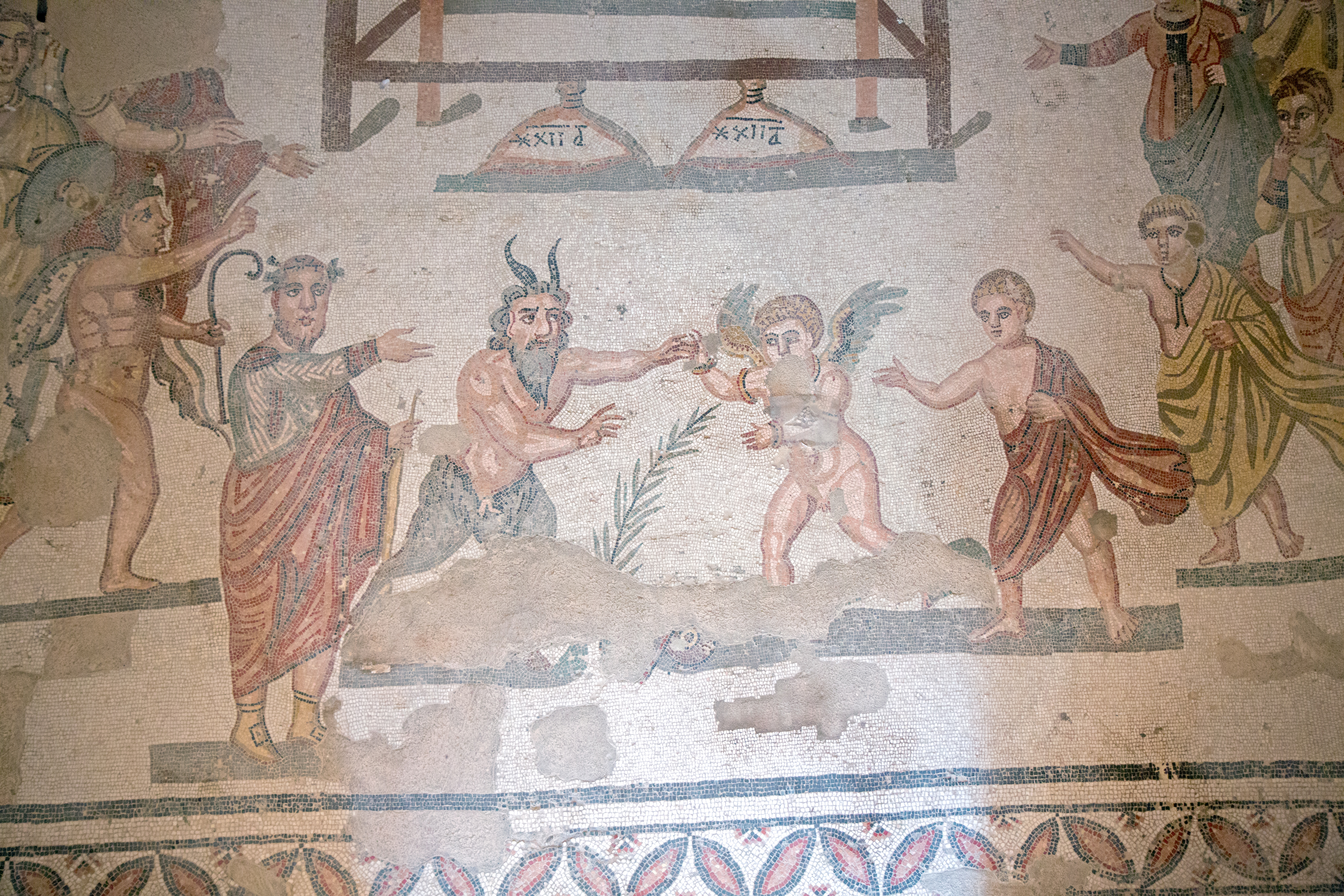 Villa Romana del Casale